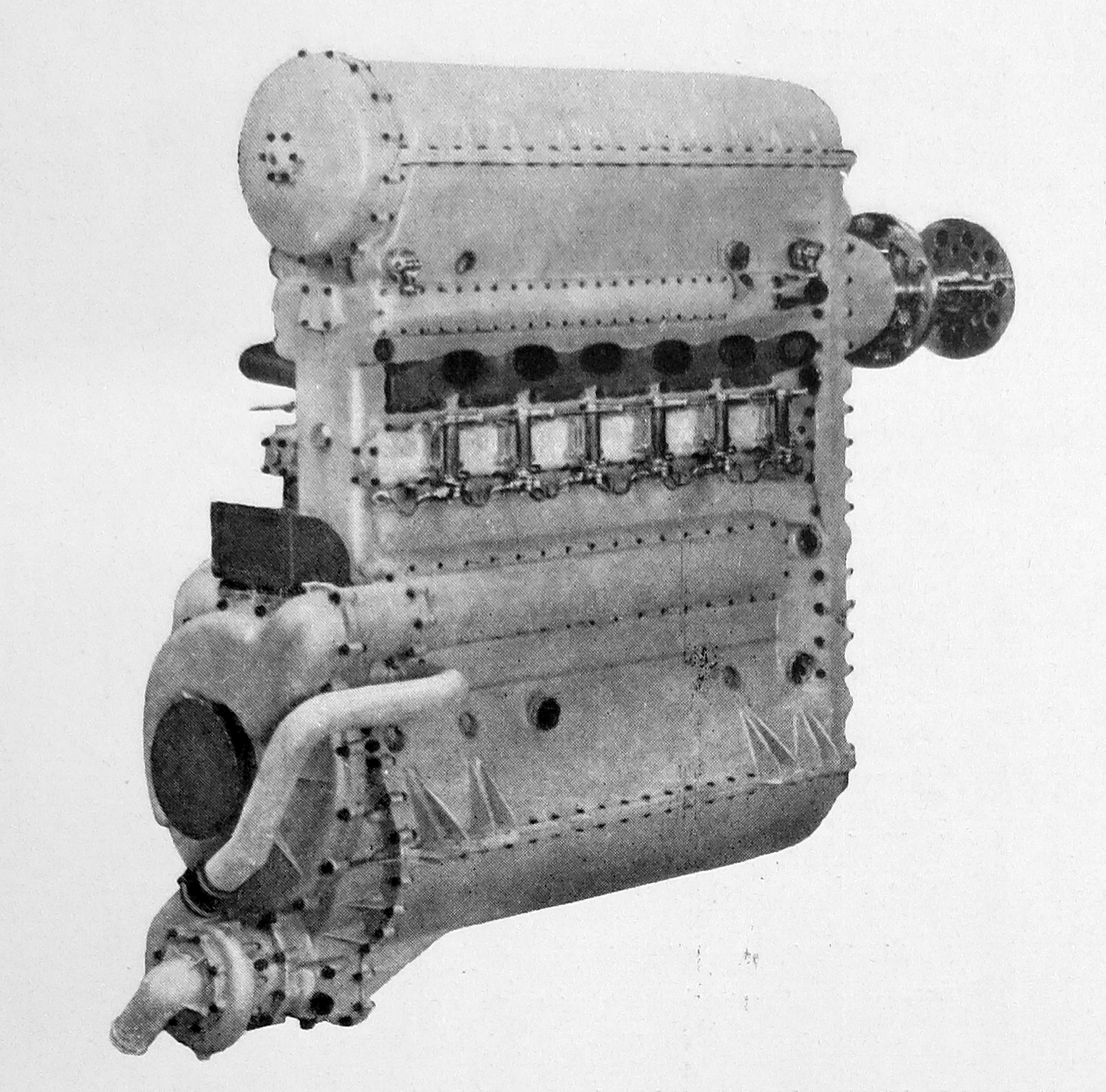 Walter Jumo IV C